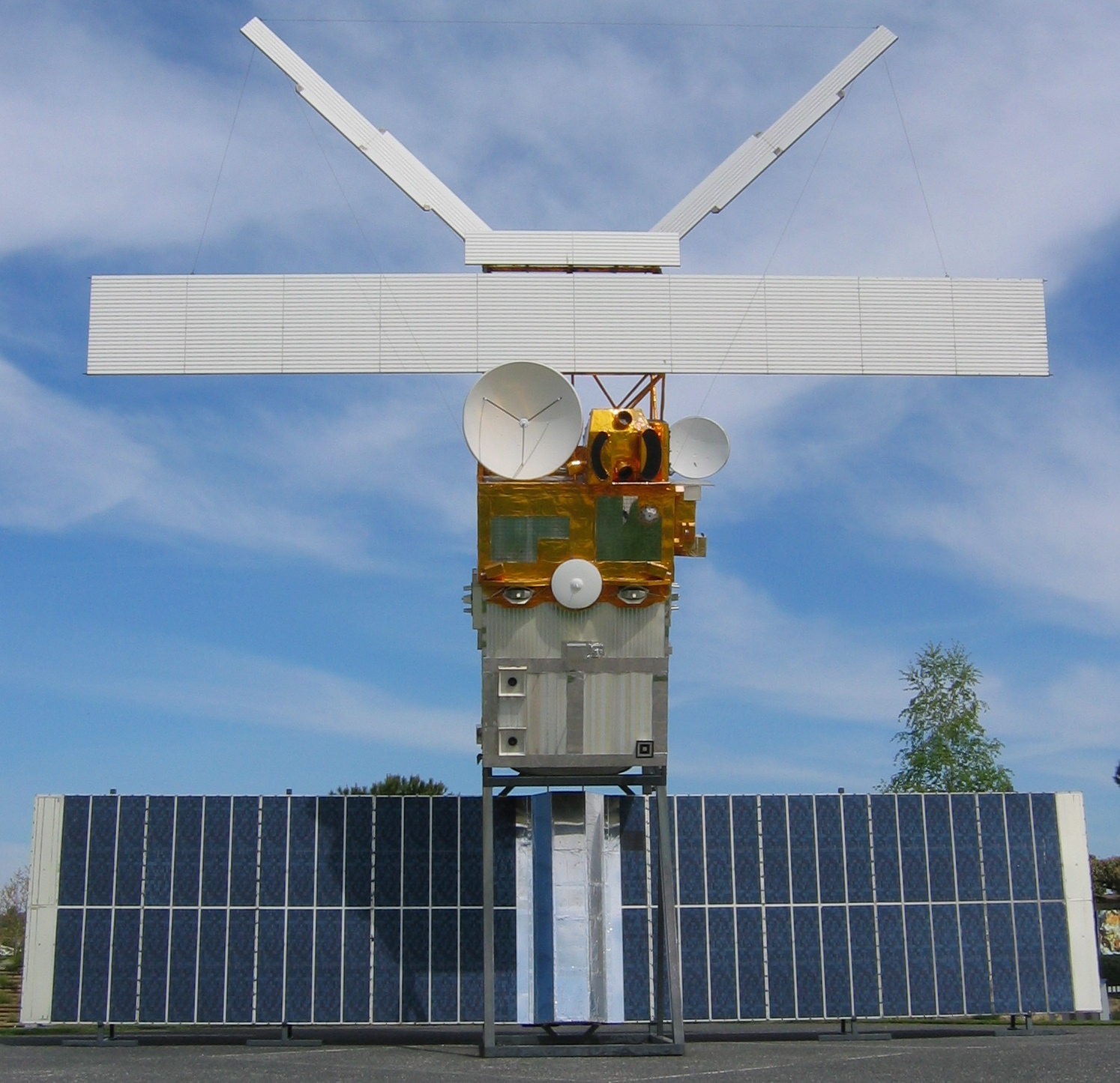 ERS 2 mock-up (real size) from Cité de l'Espace in Toulouse